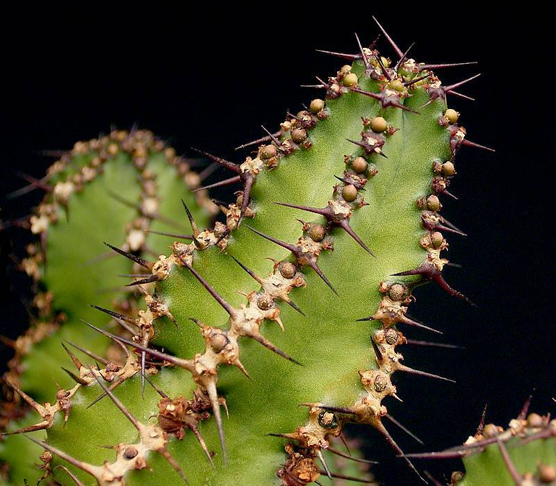 Euphorbia restricta